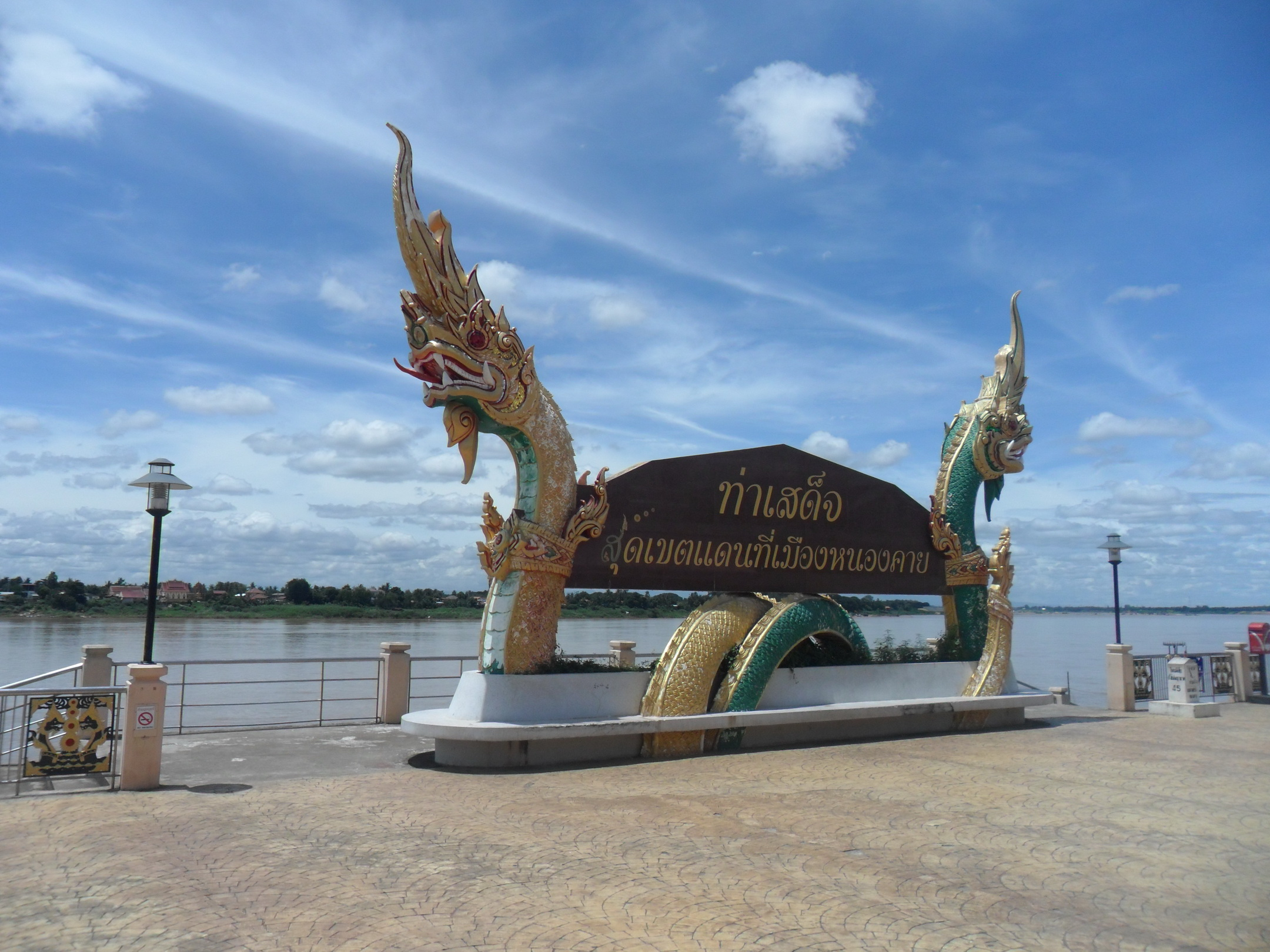 Phaya Naga, Mekong's Embankment